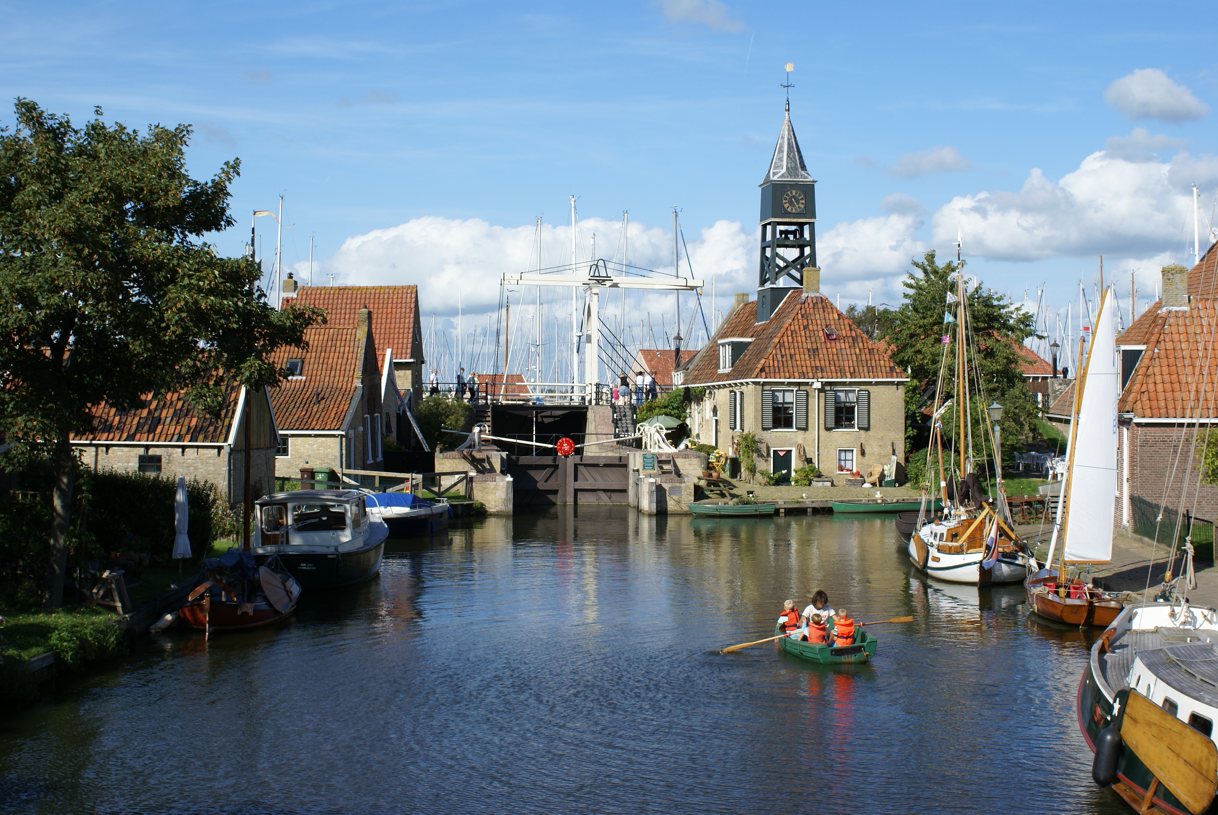 Hindeloopen,sluishuis gezien vanaf de Zijlroede